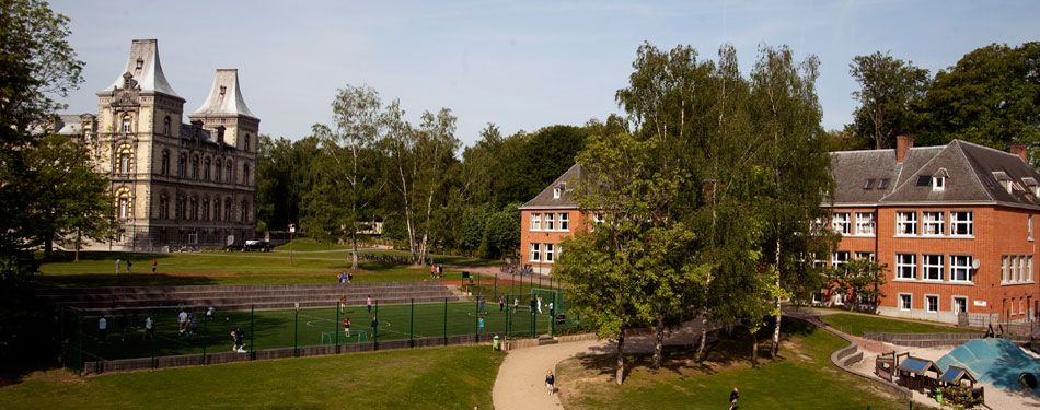 Et overblik over skolens campus område med Château d'Argenteuil til venstre i billedet og skolen til højre.